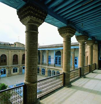 Khaje barukh house, kermanshah city, kermanshah province, iran